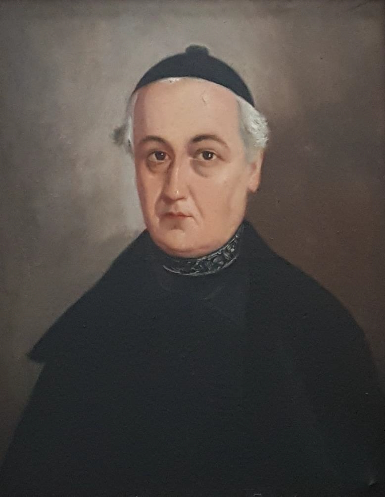 José Isidro Bonifaz (1791-1857) religioso y político peruano, presidente de la Cámara de Diputados entre 1847 y 1848.